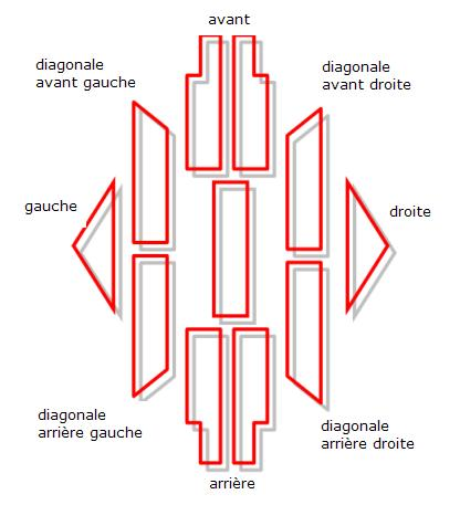 Labanotation signs set 2